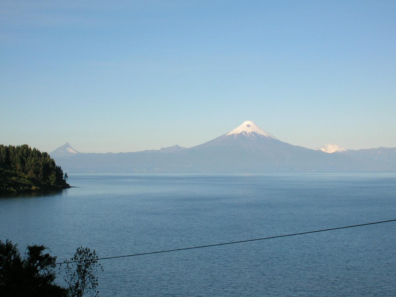 Lago Llanquihue y al fondo el Volcan Osorno, al extremo isquierdo se divisa el Volcan Puntiagudo y al derecho se ve el Cerro Tronador, todos con poca nieve después del verano. Puerto Varas - Chile